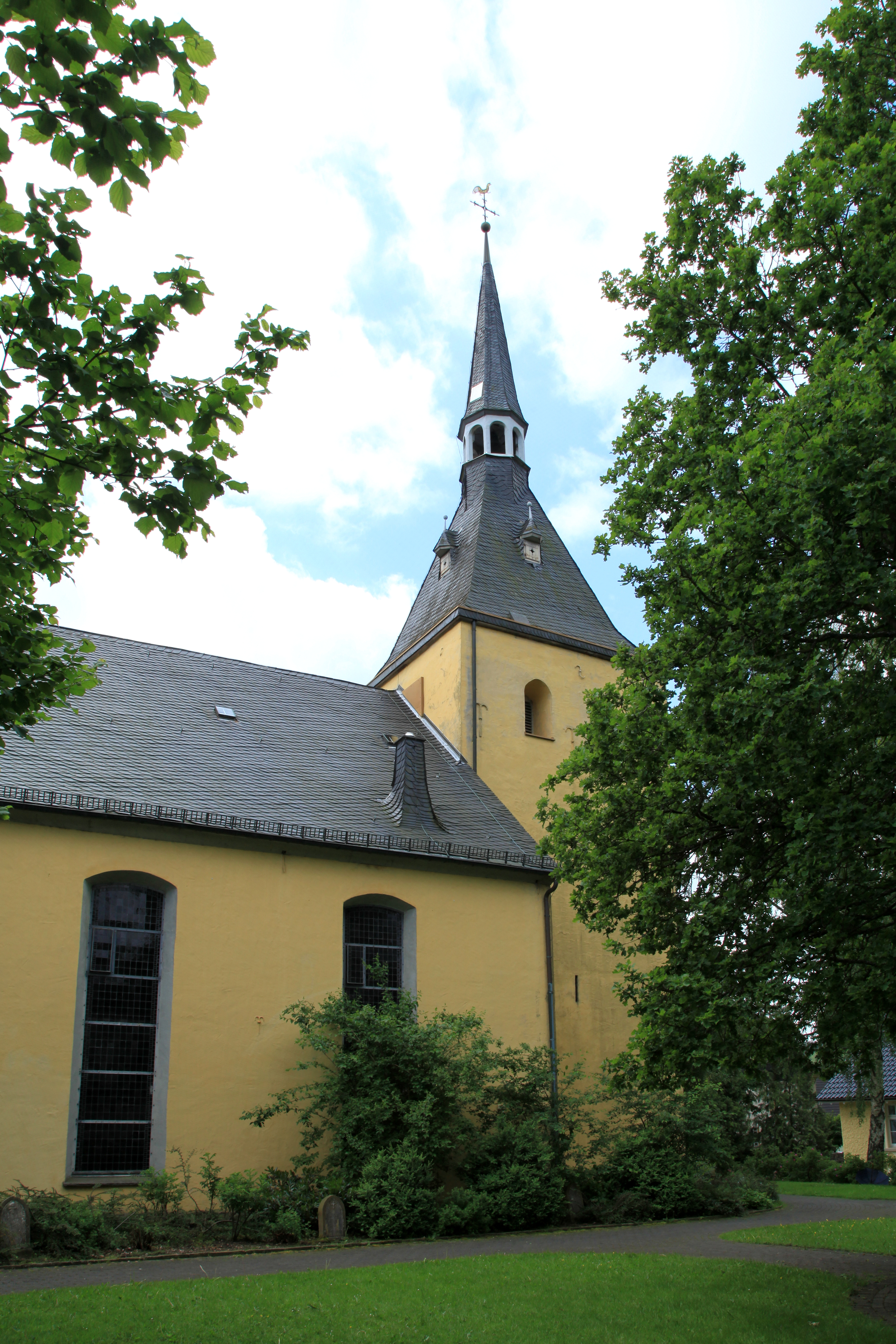 Servatiuskirche, Kirchstraße / Vor dem Isern in Rönsahl, Kierspe